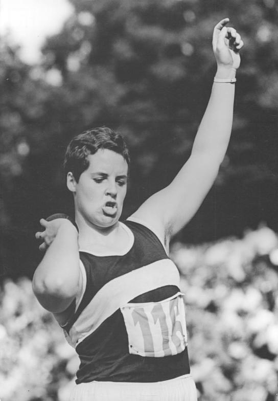 Margitta Gummel Zentralbild Koch 04.09.1968 Leipzig: Margitta Gummel stellte Kugelstoßrekord auf.Auf einem Sportfest des SC DHfK in Leipzig stellte am 03.09.1968 Margitta Gummel (SC DHfK Leipzig-Foto von den DDR-Meisterschaften am 11.08.1968 in Erfurt) mit 18,43 m einen neuen deutschen Rekord der DDR im Kugelstoßen auf.